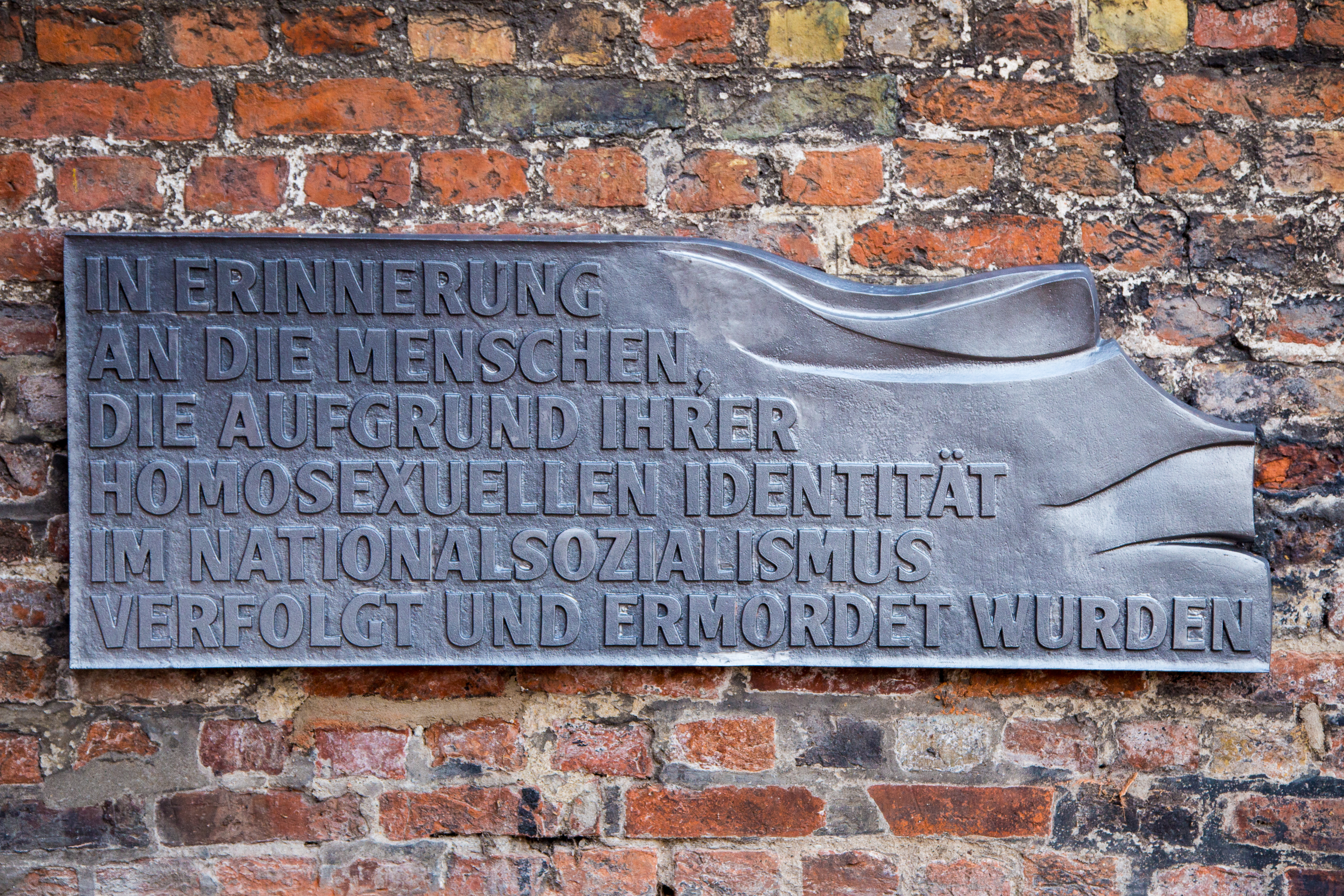 Das Denkmal wurde vom Lübecker Künstler Erich Lethgau geschaffen und von der Hansestadt Lübeck sowie dem Lübecker CSD e.V., der seinen Anteil durch Spenden aufbrachte, finanziert. Die Inschrift lautet „In Erinnerung an die Menschen, die Aufgrund ihrer homosexuellen Identität im Nationalsozialismus verfolgt und ermordet wurden“.